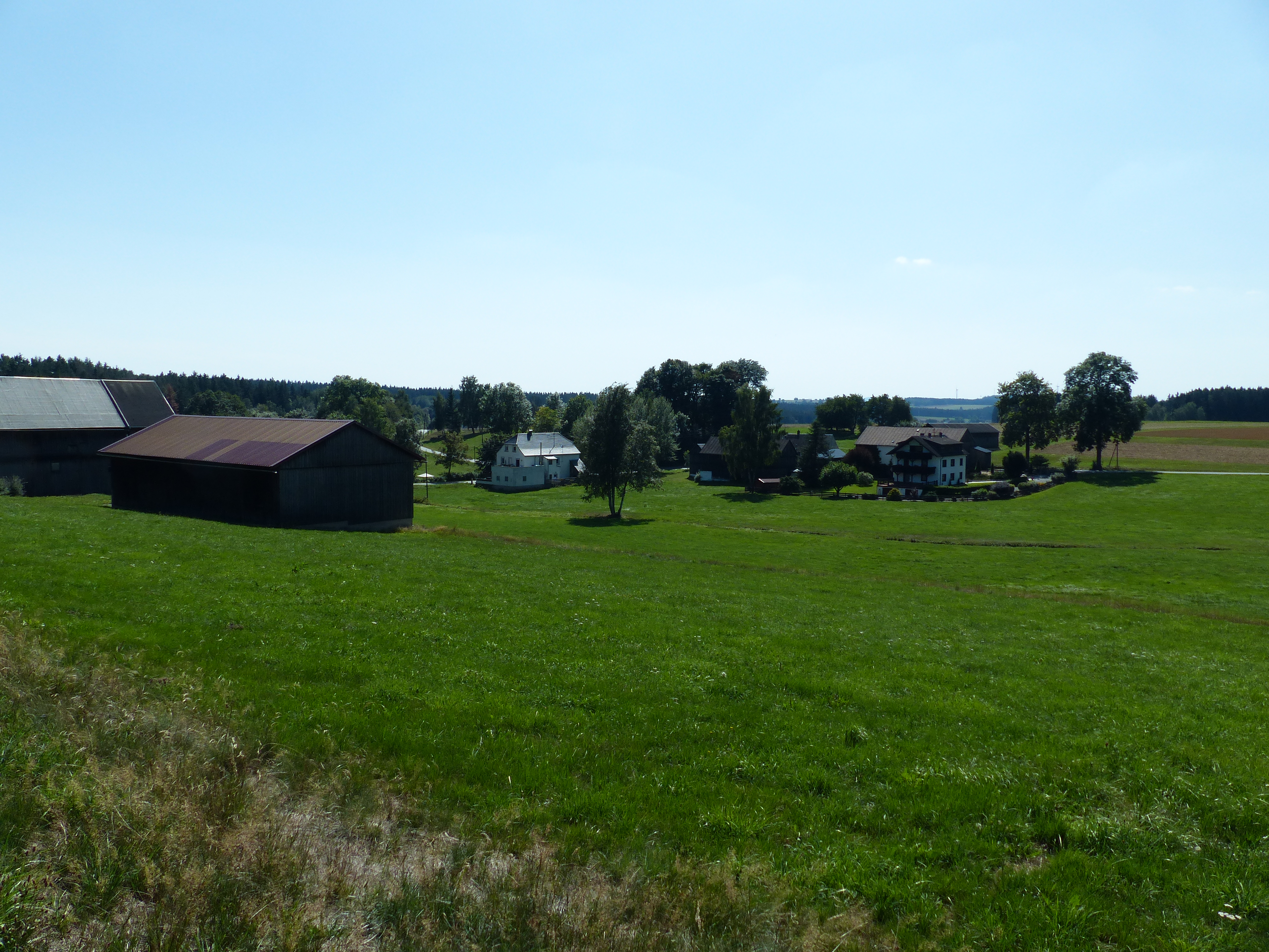 Neuhausen, Ortsteil von Rehau und Grenzgebiet